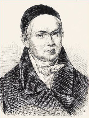 István Mándi Márton, professor of philosophy in the Pápa Reformed College 1790-1831.Mándi Márton István, a Pápai Református Kollégium filozófiaprofesszora 1790-1831 között.